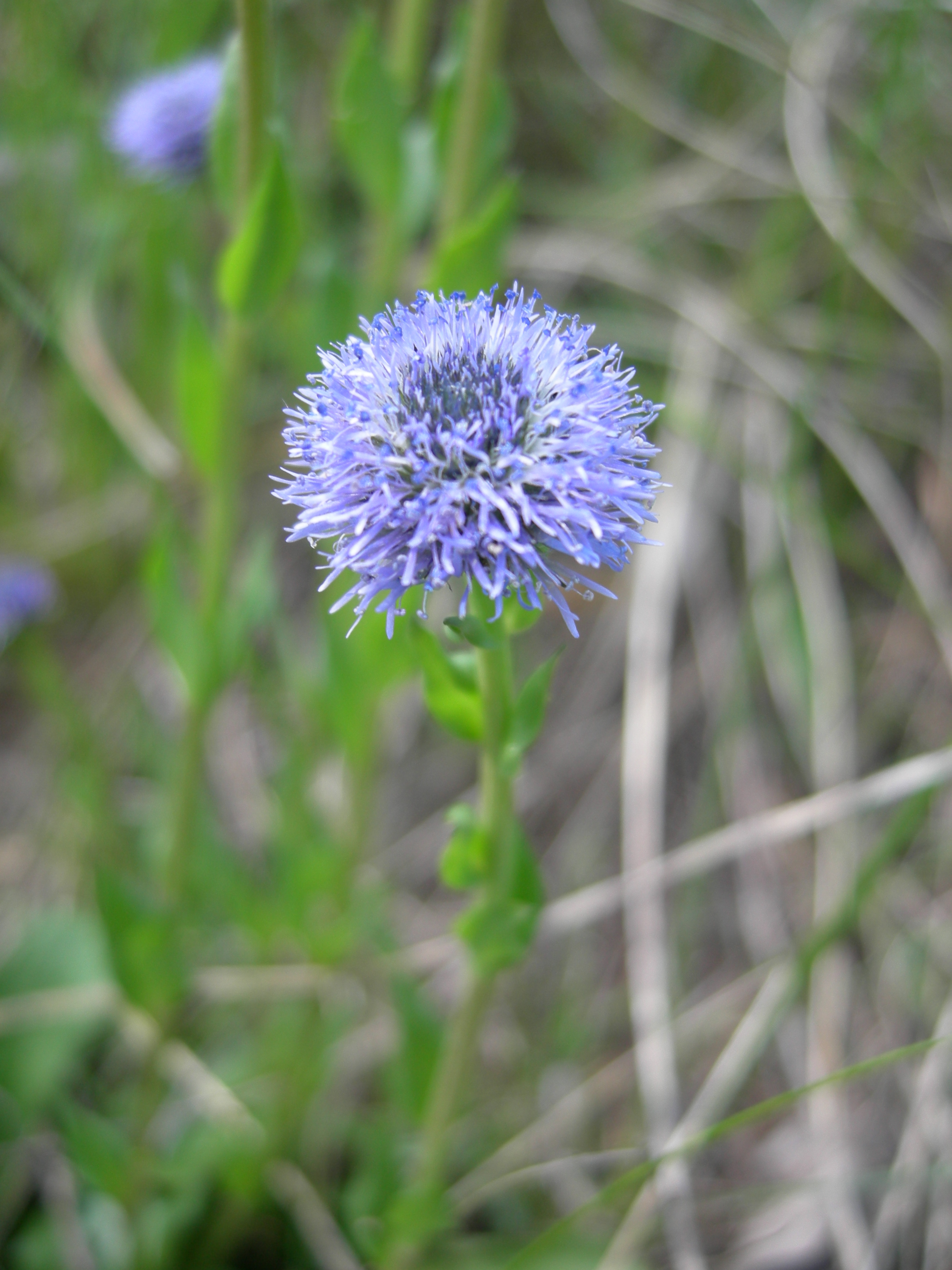 Globularia punctata (Navadna mračica), Kraški rob, Slovenia